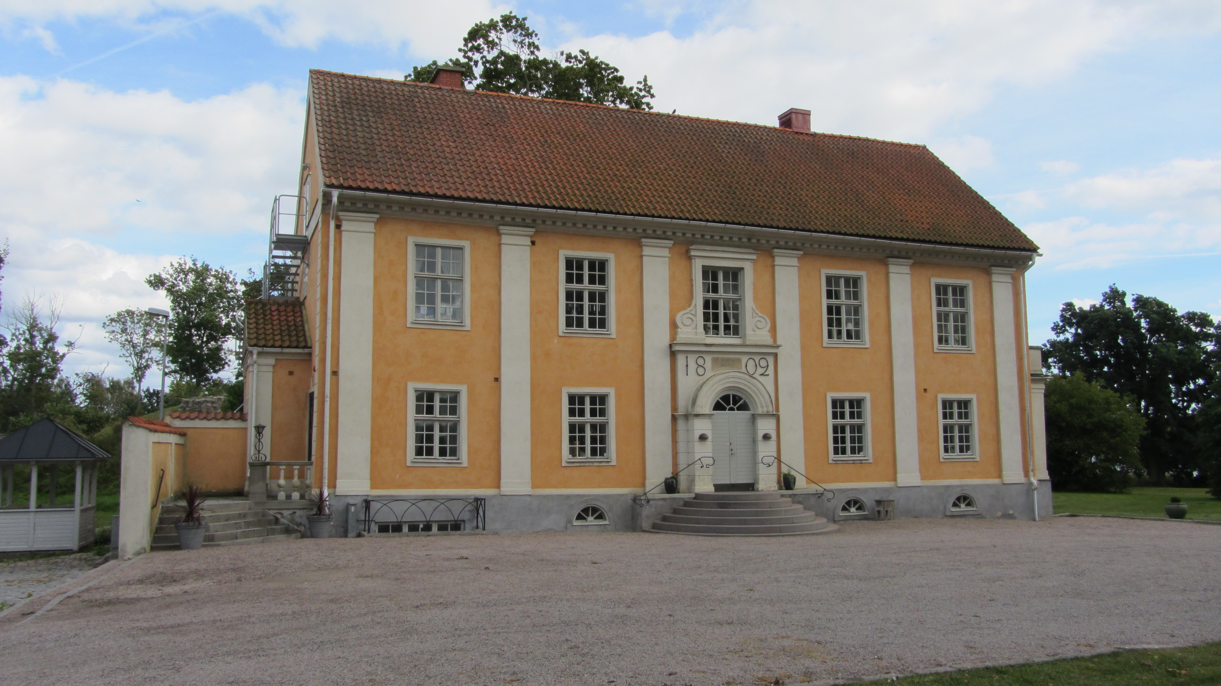 Sölvesborgs slott, corps de logi